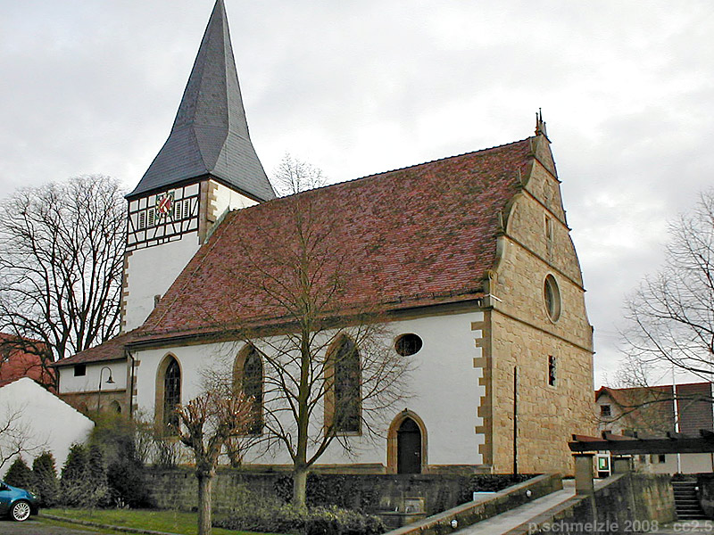 Evangelische Lambertuskirche in Pfaffenhofen (Württ.)